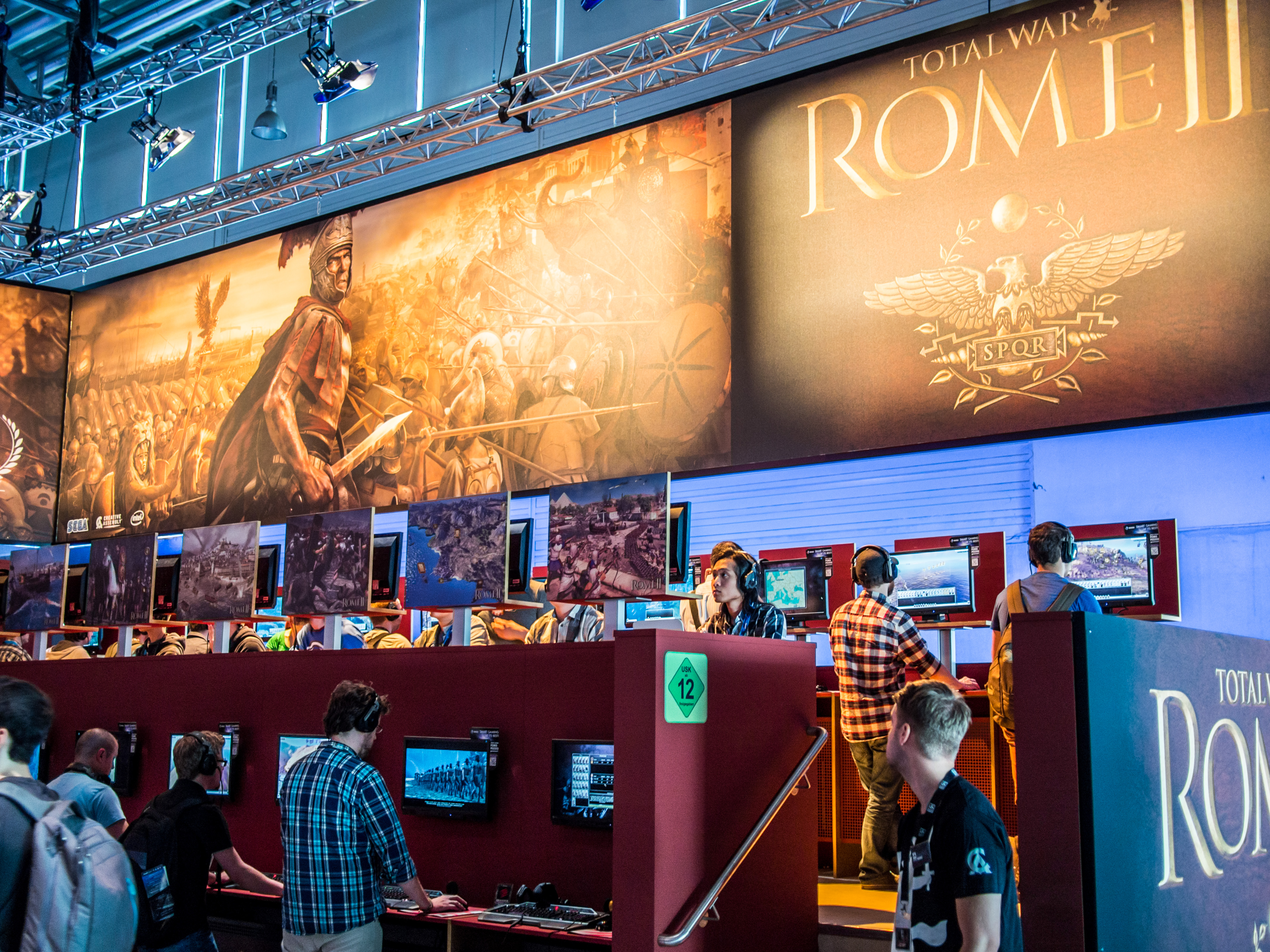 Gamescom expo, Cologne, Germany